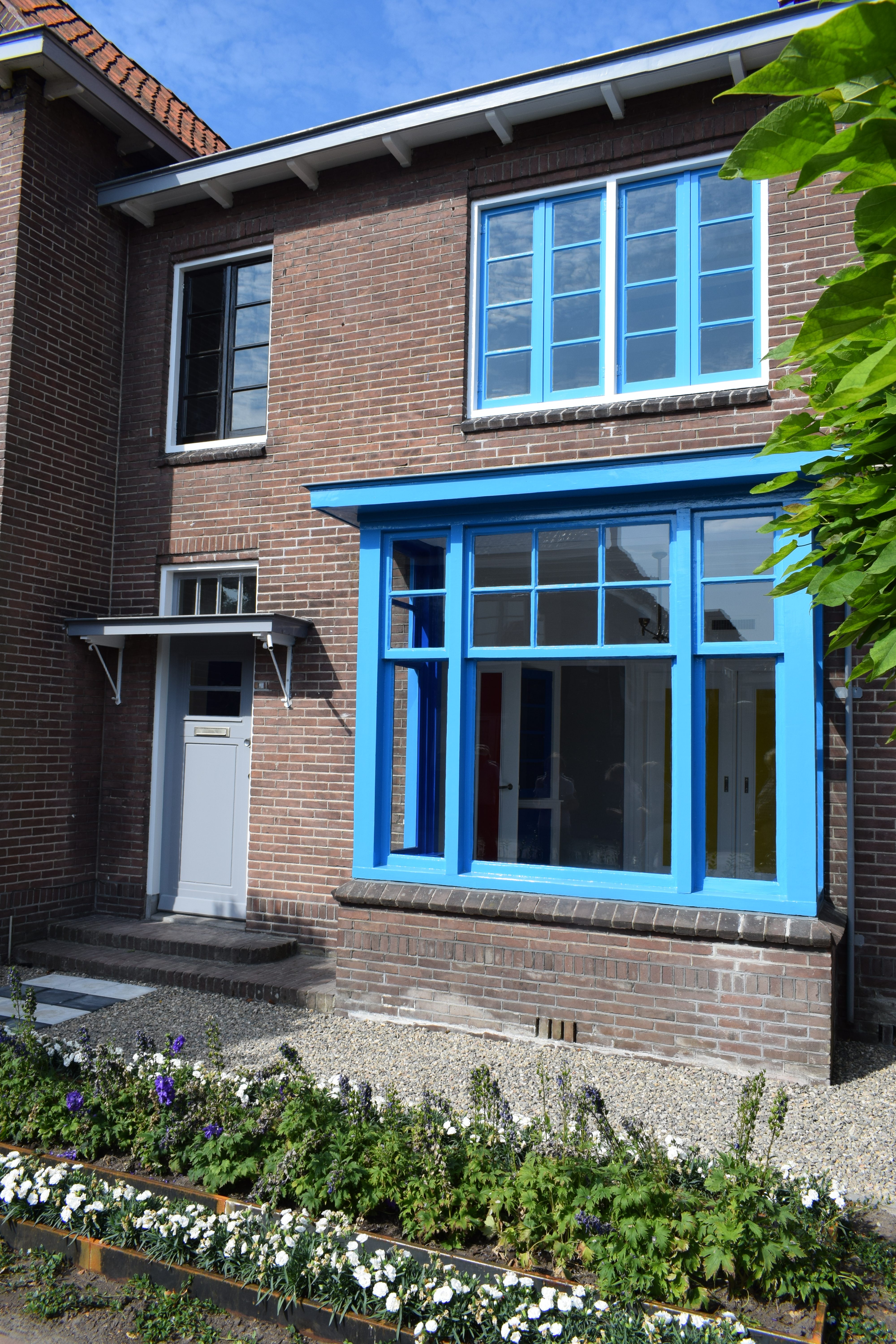 Vue de la Torenstraat à Drachten, en Frise (Pays-Bas).